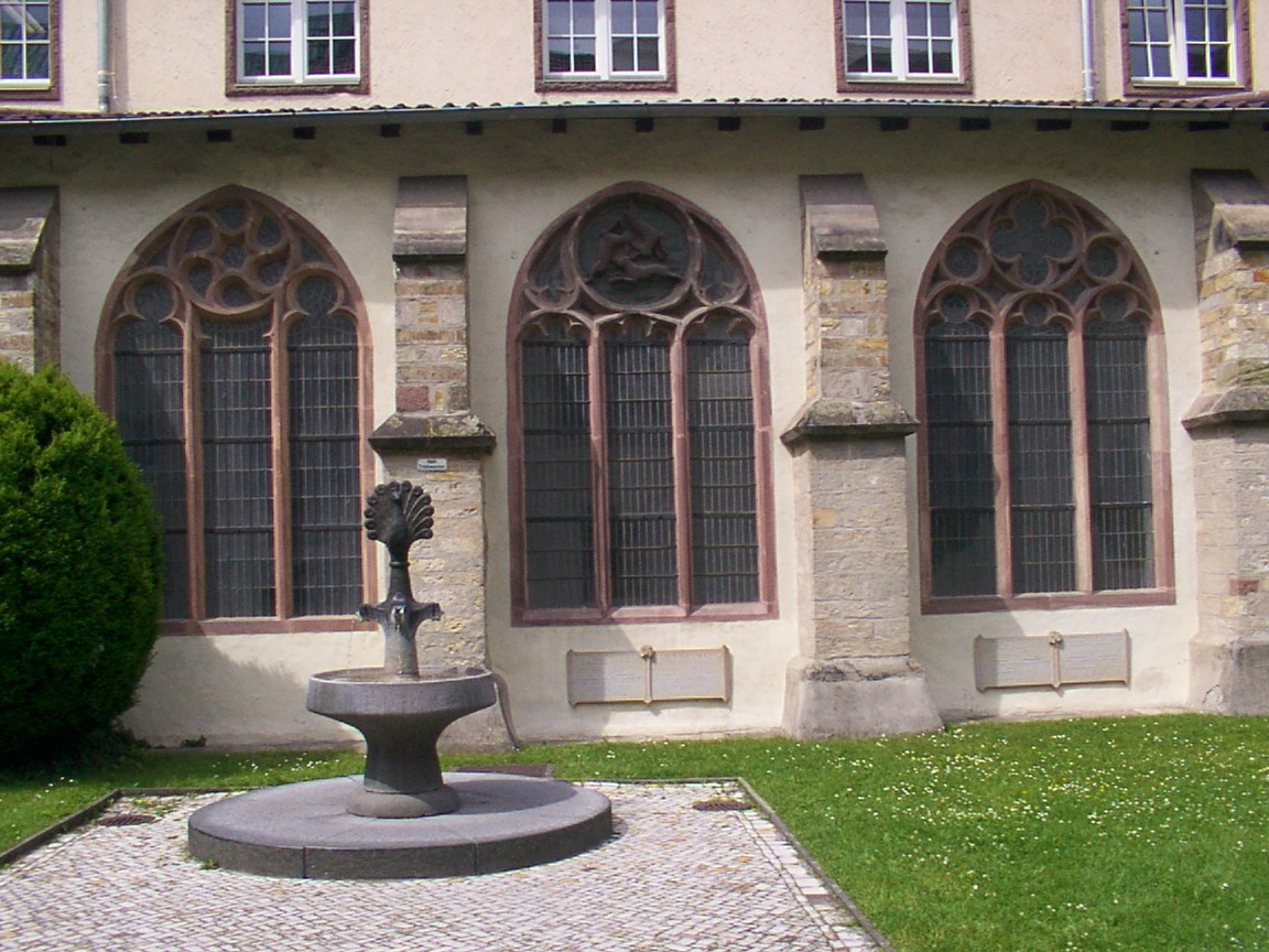 Paderborner Dom: Kreuzgang mit Brunnen und Dreihasenfenster